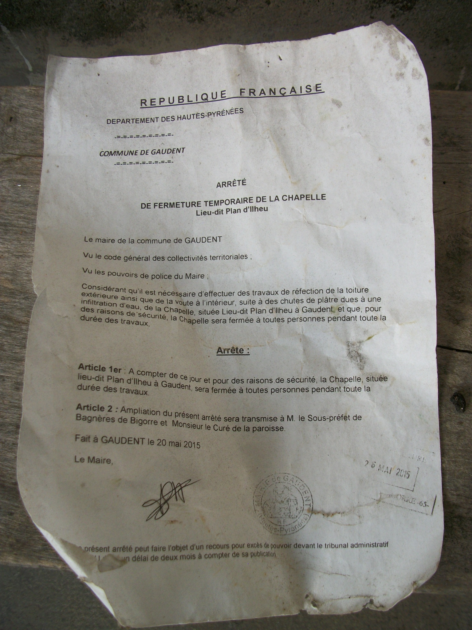 Arrêté informant de la fermeture temporaire de la chapelle depuis le 26 mai 2015